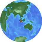 Map Indonesia 12/09/07